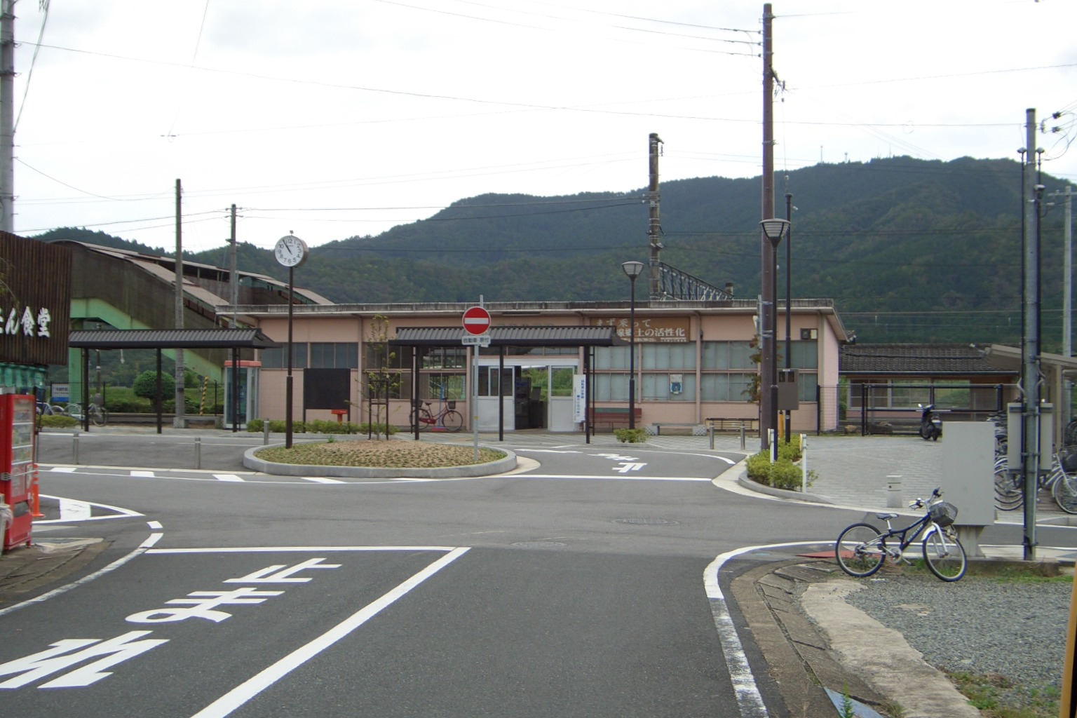 西日本旅客鉄道福知山線丹波竹田駅